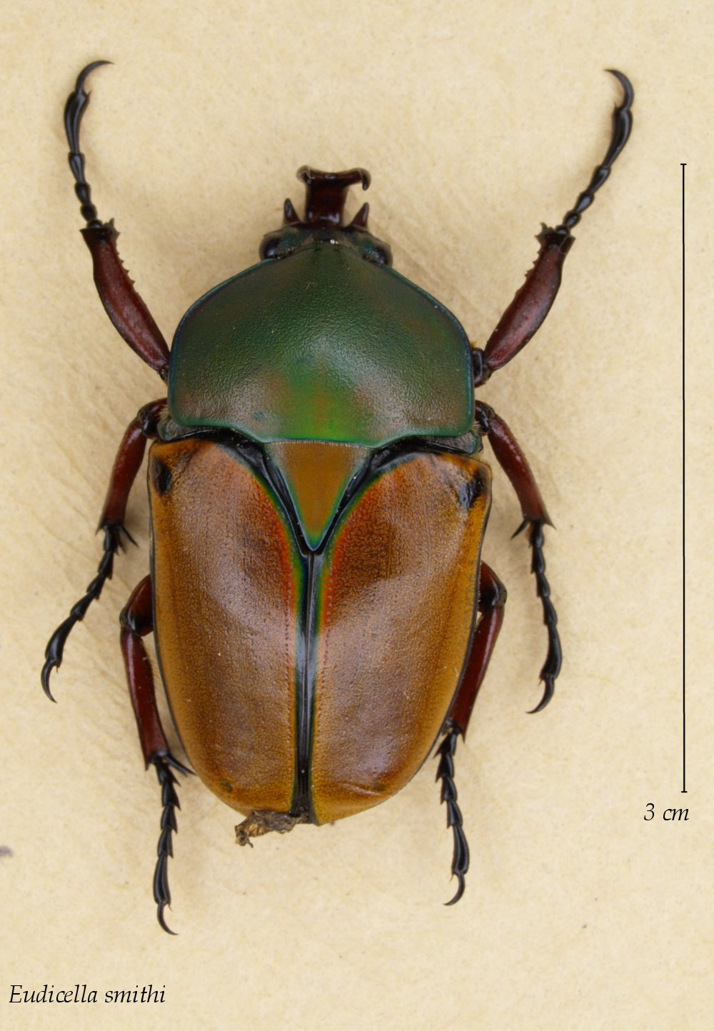 eigen foto 6/12/2006 E van Herk